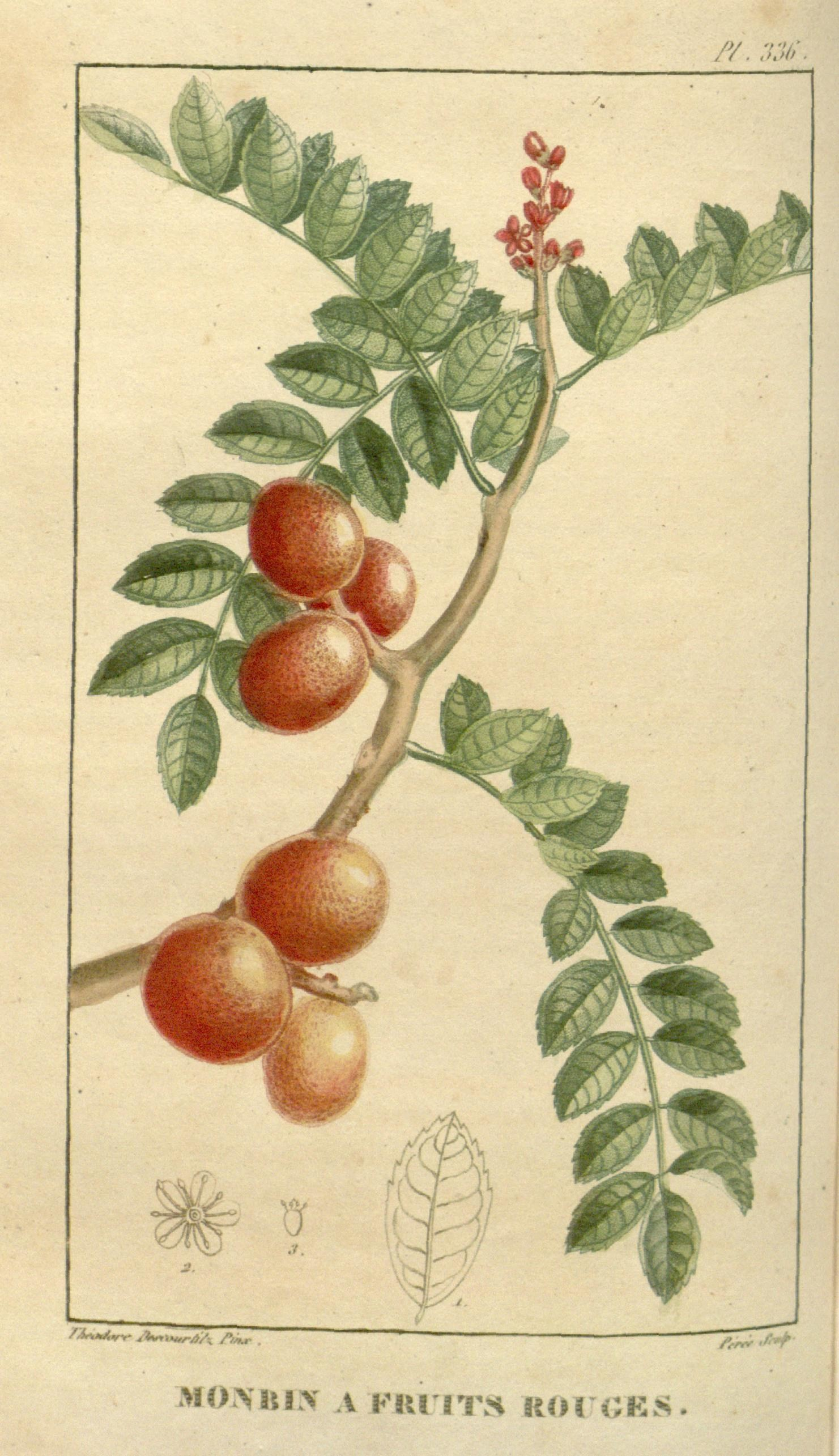 /'/. 33$ /An*iw . * II» M Jj\ S^'W MOMlLX A FIUITH ROUGES.